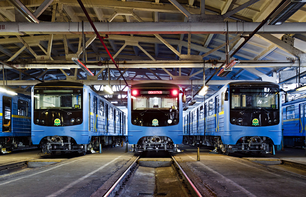 Вагоны метро типа Е-КМ-Гб в депо Дарница.